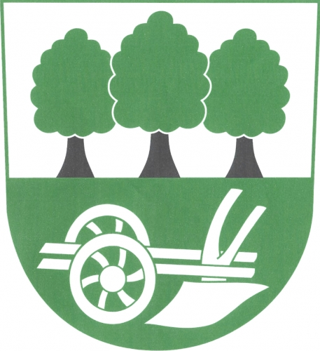 znak, Očelice, okres Rychnov nad Kněžnou